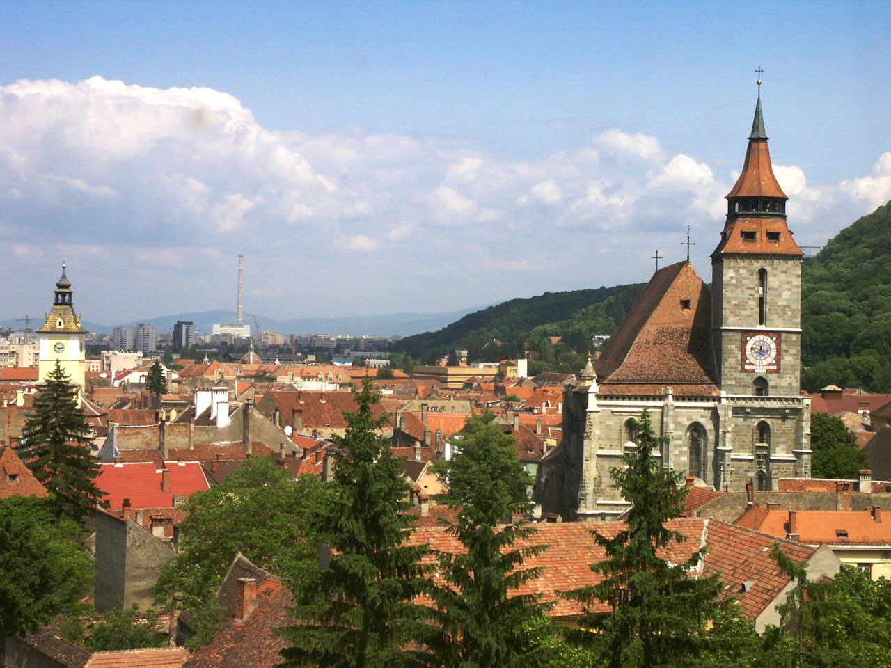 Brasov